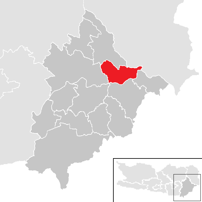 Bezirk Völkermarkt